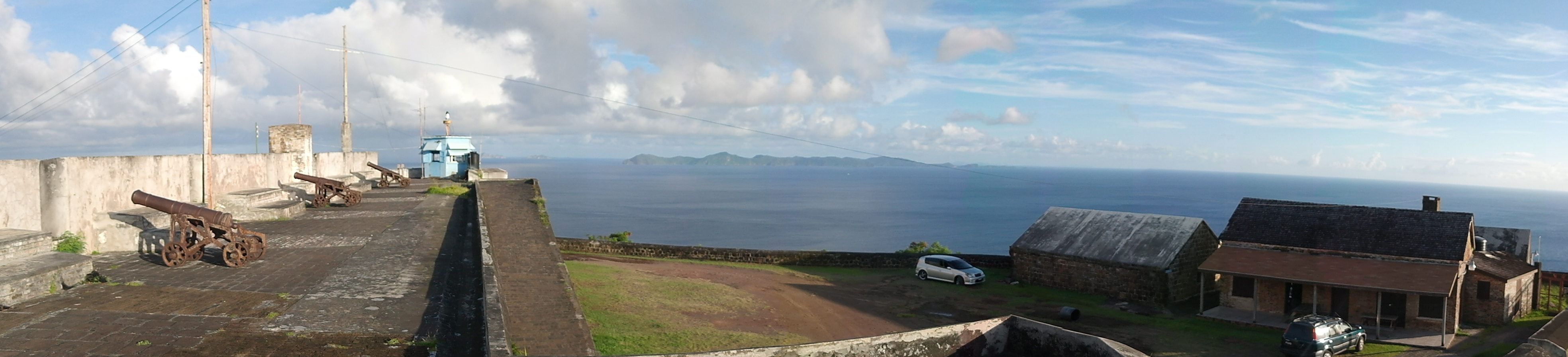 Panoramic view of Fort Charlotte, Kingstown, SVG